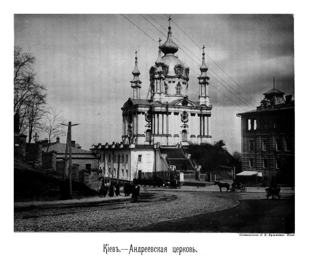 Андріївська церква Київ (St. Andrew's Church, Kyiv) (1888